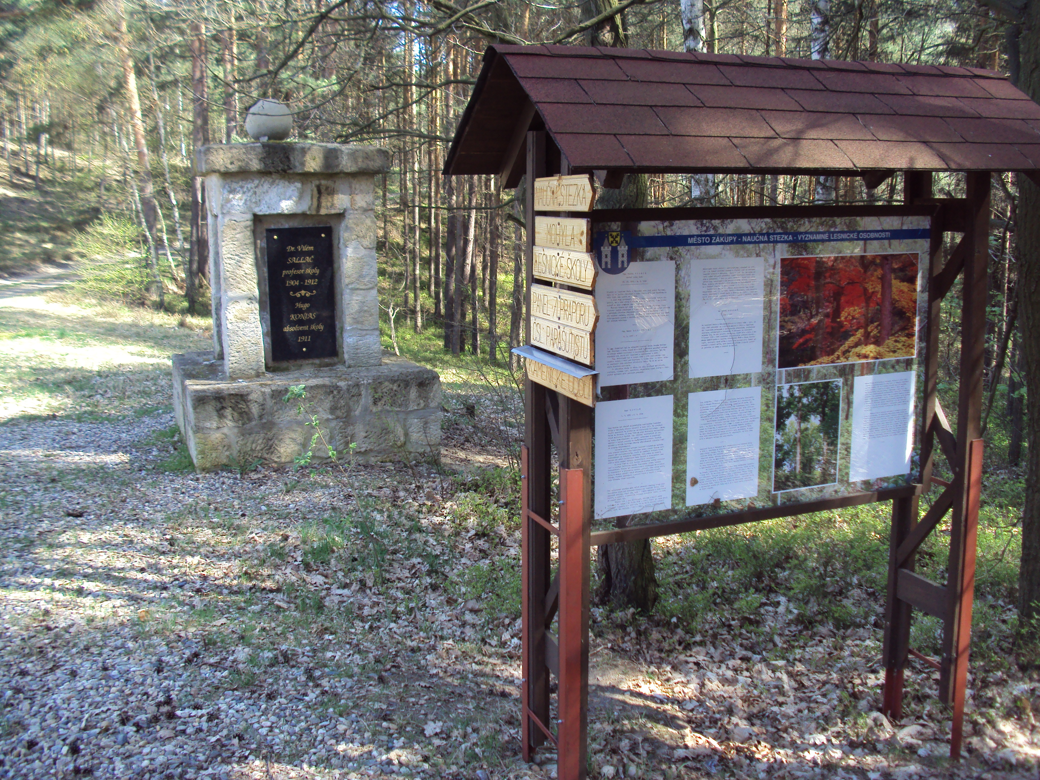 Mohyla lesnických osobností na naučné stezce, svah proti Novým Zákupům